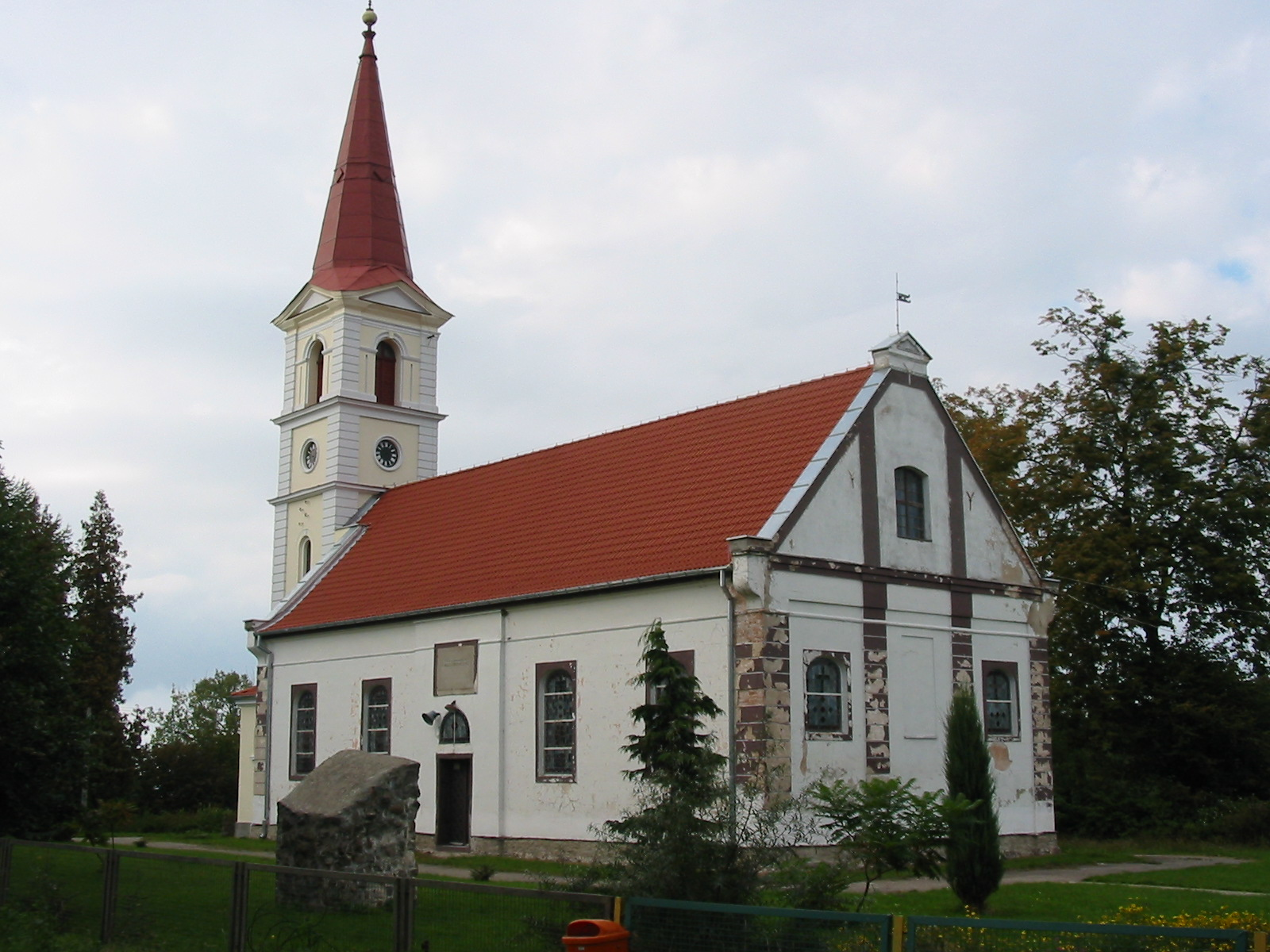 Łęcze - kościół parafialny pw. Najświętszego Serca Jezusowego